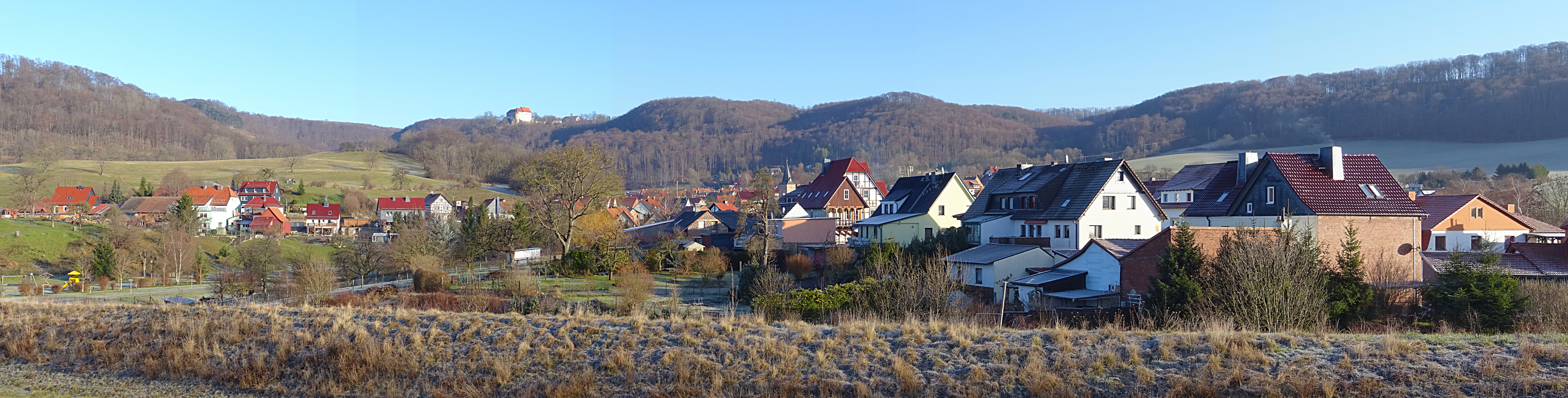 Blick vom Unstrut-Hahle-Radweg über Wintzingerode zur Burg Bodenstein